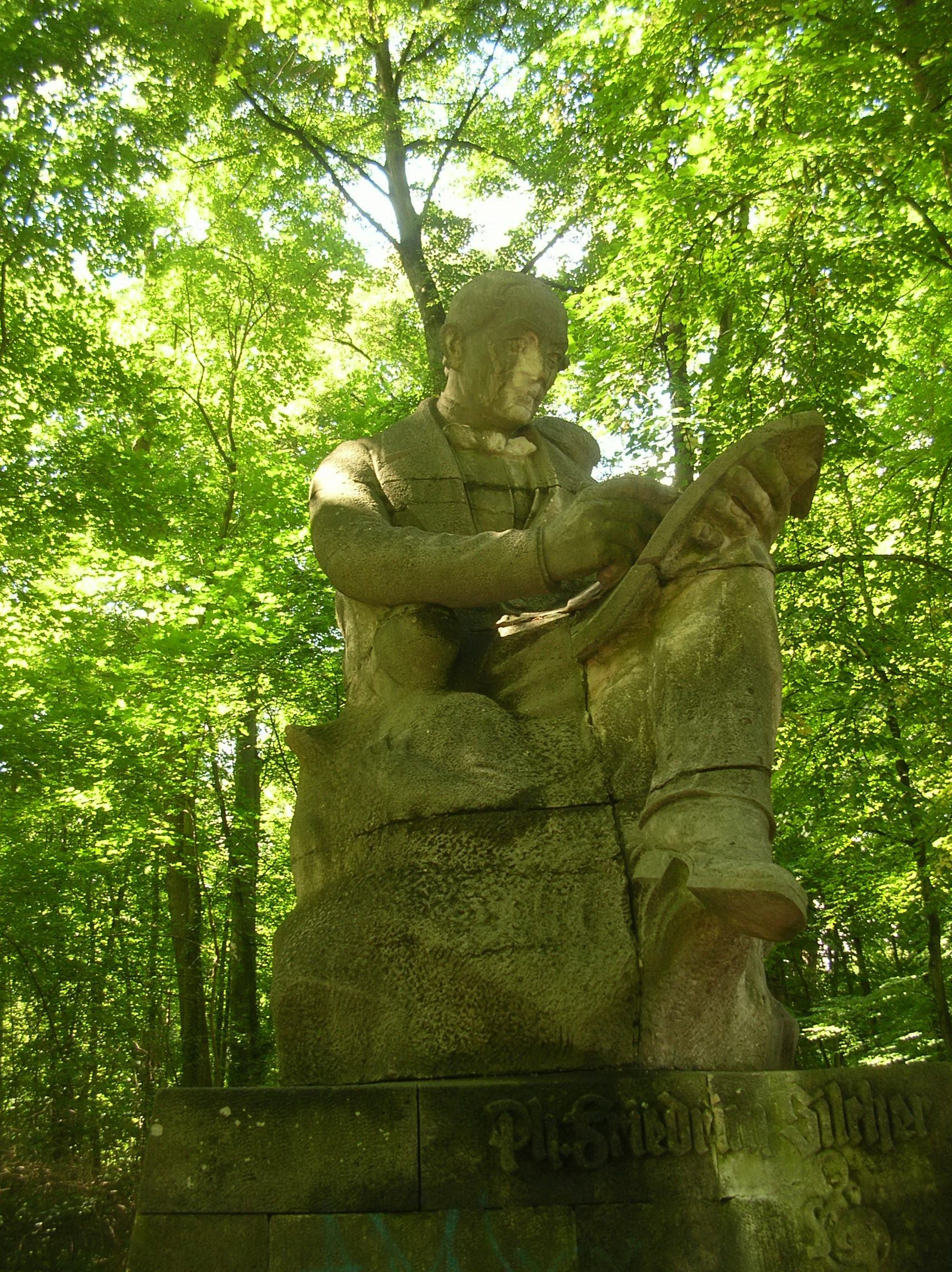 Silcherdenkmal in Tübingen (Platanenallee)